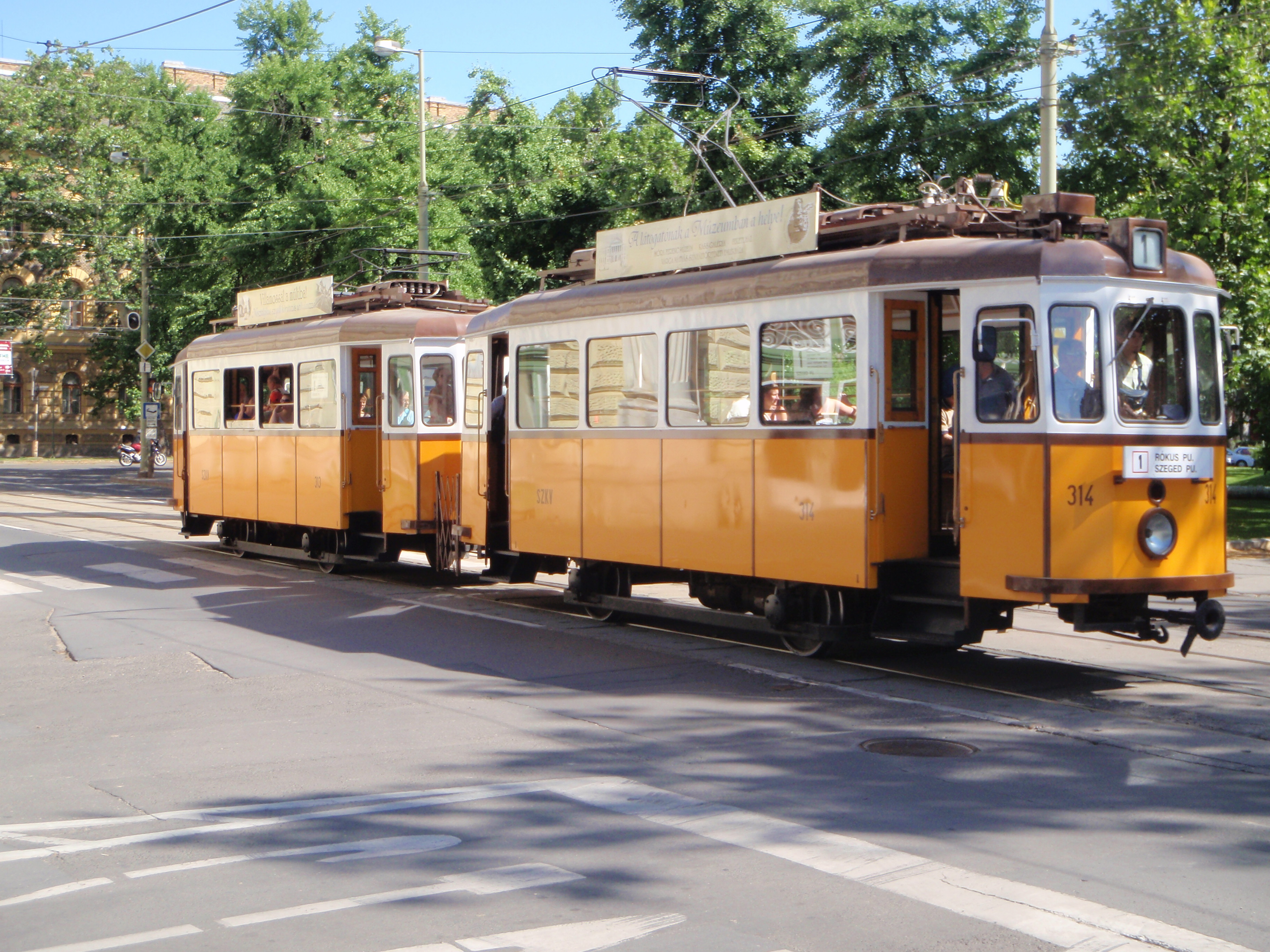 Szeged SZKV1 egykori járműve